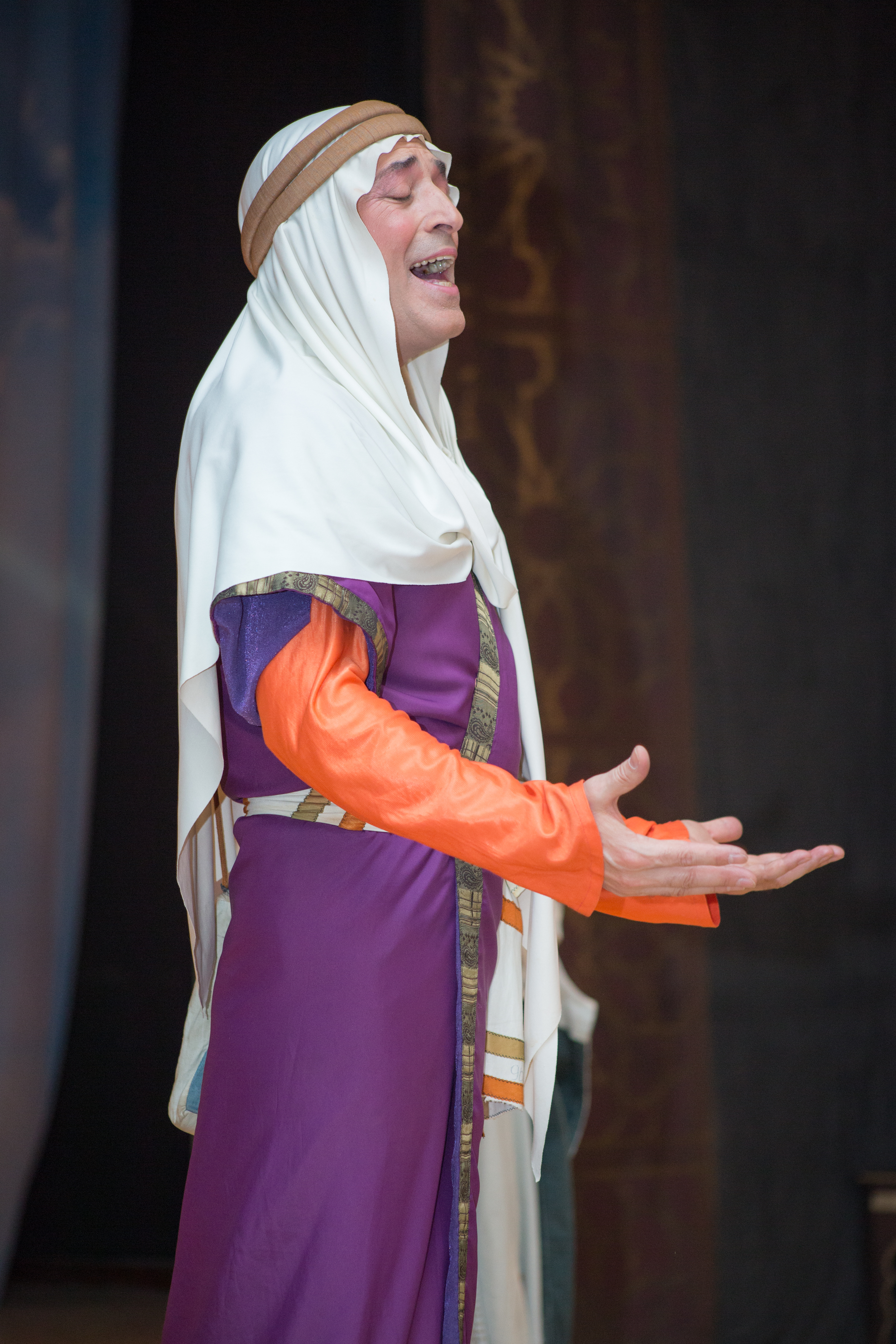 Baku opera and ballet theatre, Leyli and Majnun